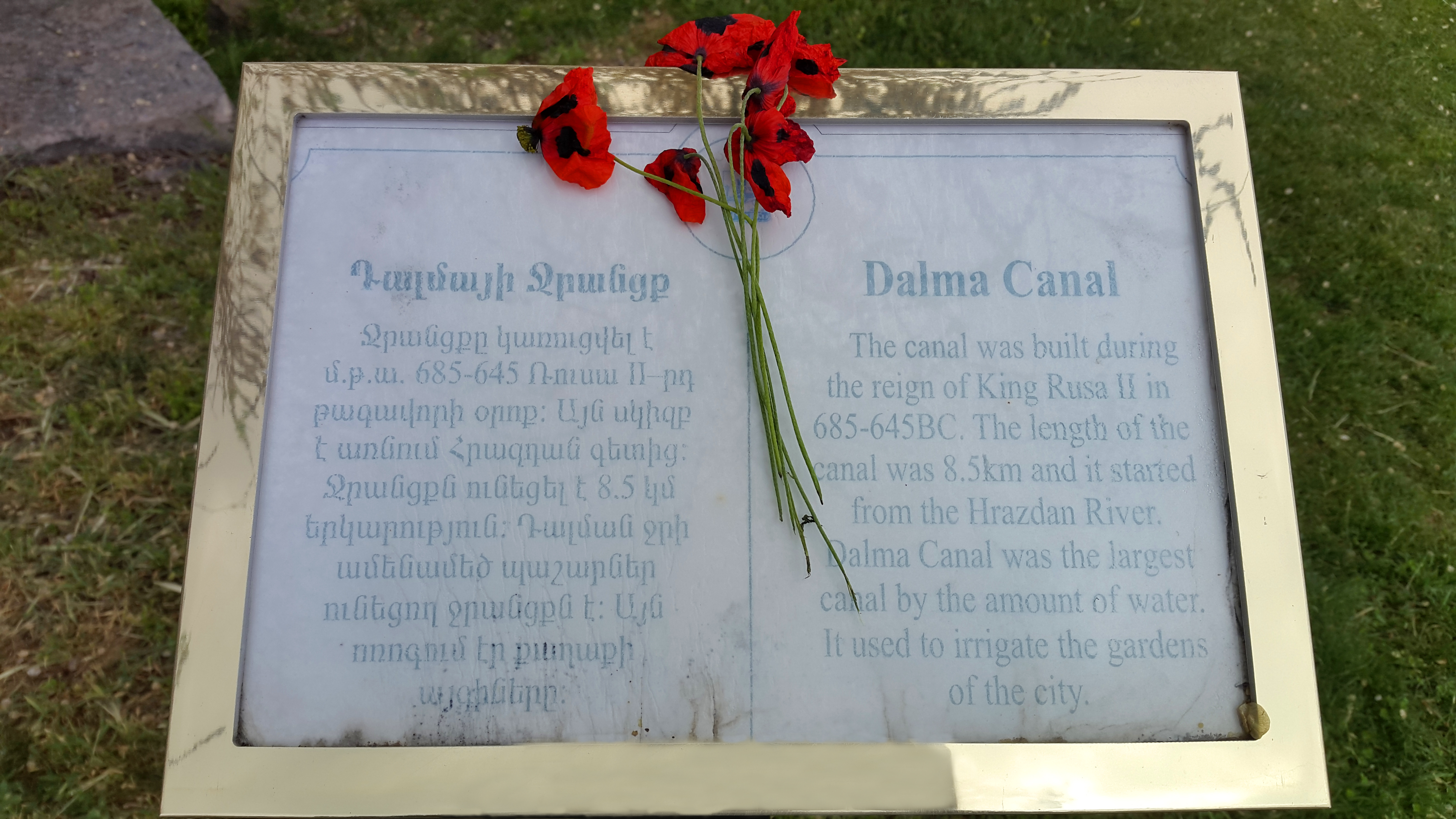 Դալմայի ջրանցքի ցուցանակը